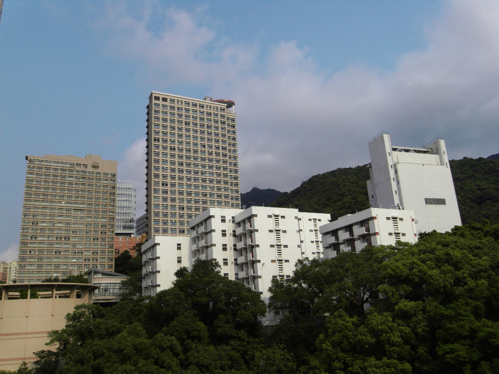 香港何東夫人紀念堂及施德堂